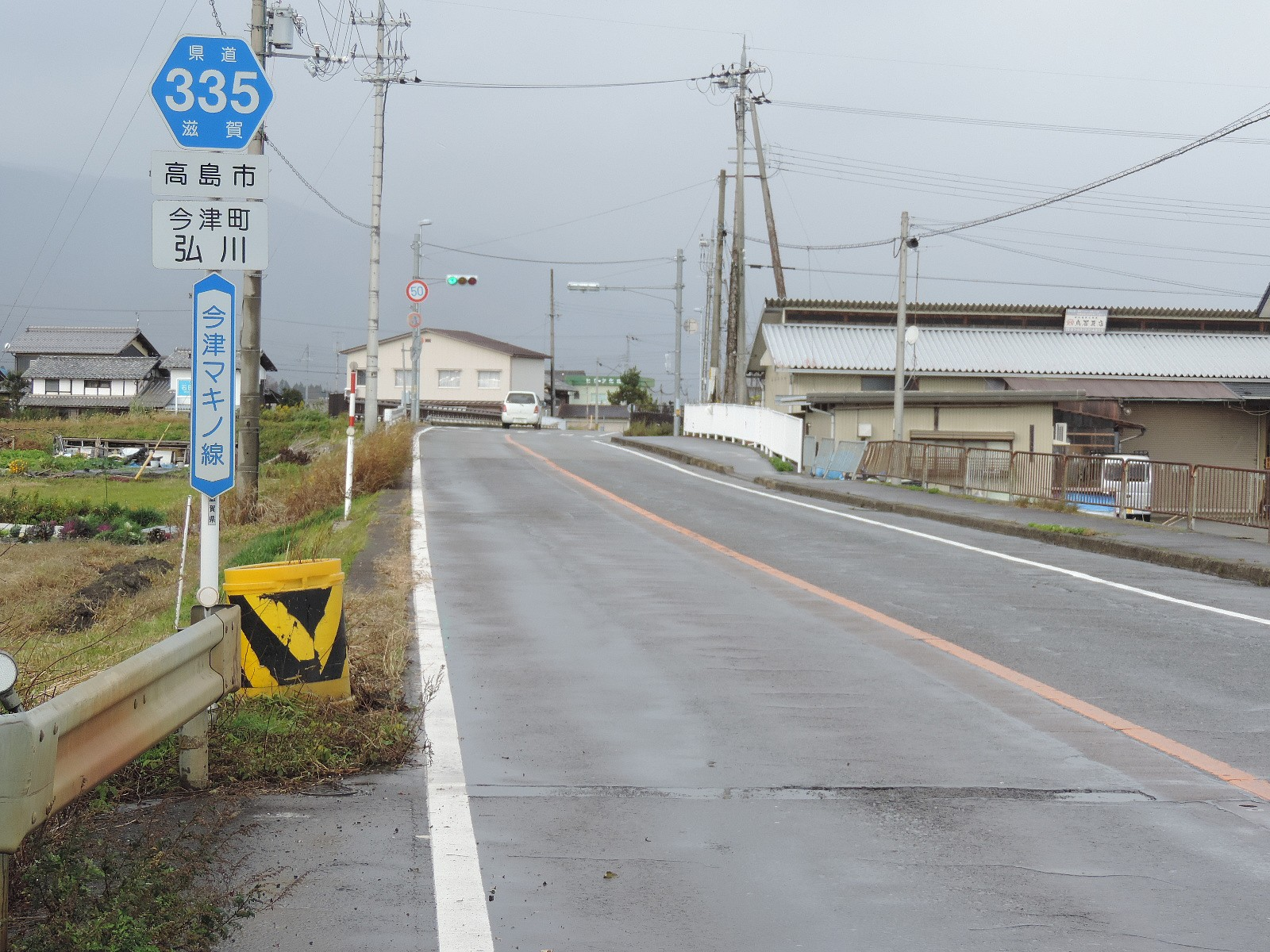 滋賀県道335号今津マキノ線。高島市今津町弘川にて。2017年撮影